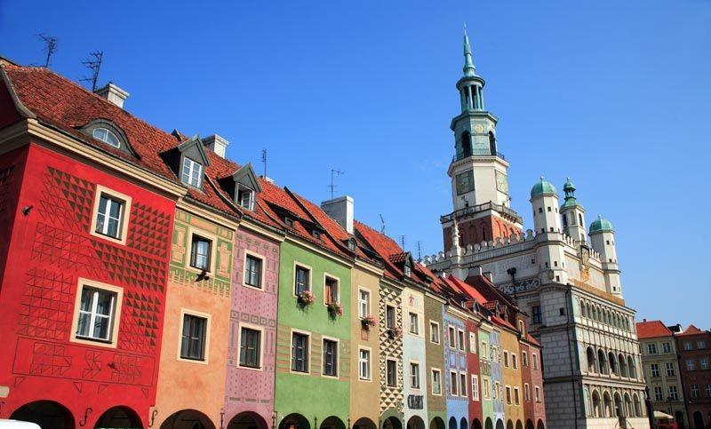 Polska by Ewa and Maek Wojciechowsy